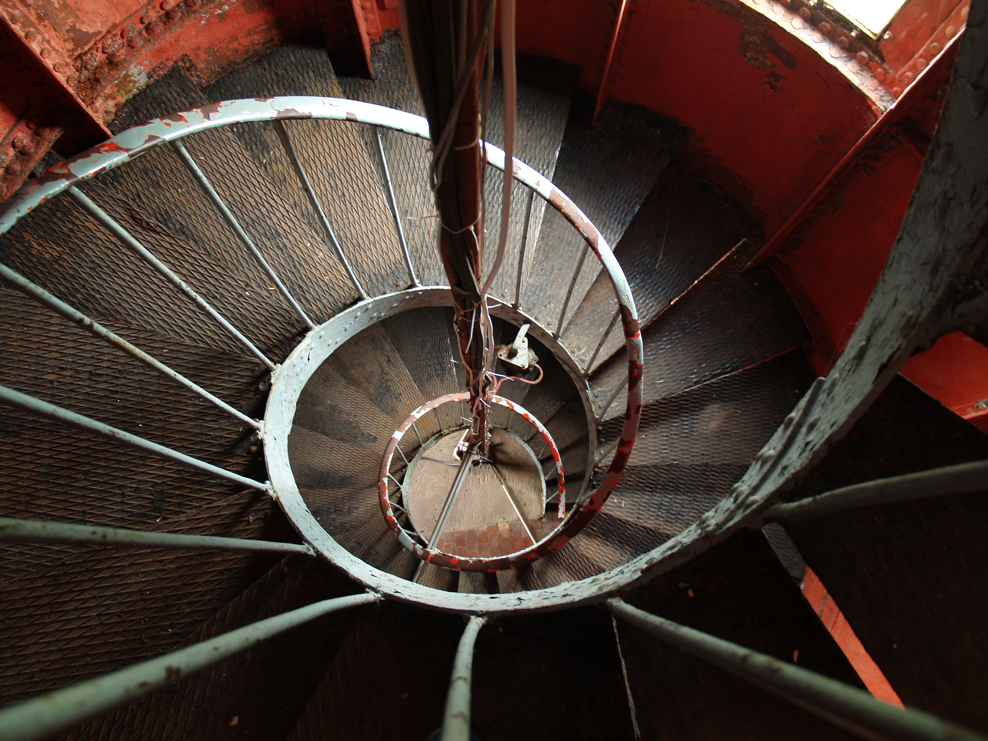 Keri tuletorn, 1719-1803